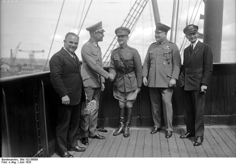 Begeisterter Empfang der Ozeanflieger in Bremerhaven! Erste Aufnahmen der Empfangsfeierlichkeiten an Bord des Dampfers "Columbus". Vertreter der Reichswehr begrüßen die Ozeanflieger auf dem Dampfer Columbus. Links Hauptmann Köhl, Mitte Major Fitzmaurice, rechts Freiherr von Hünefeld.